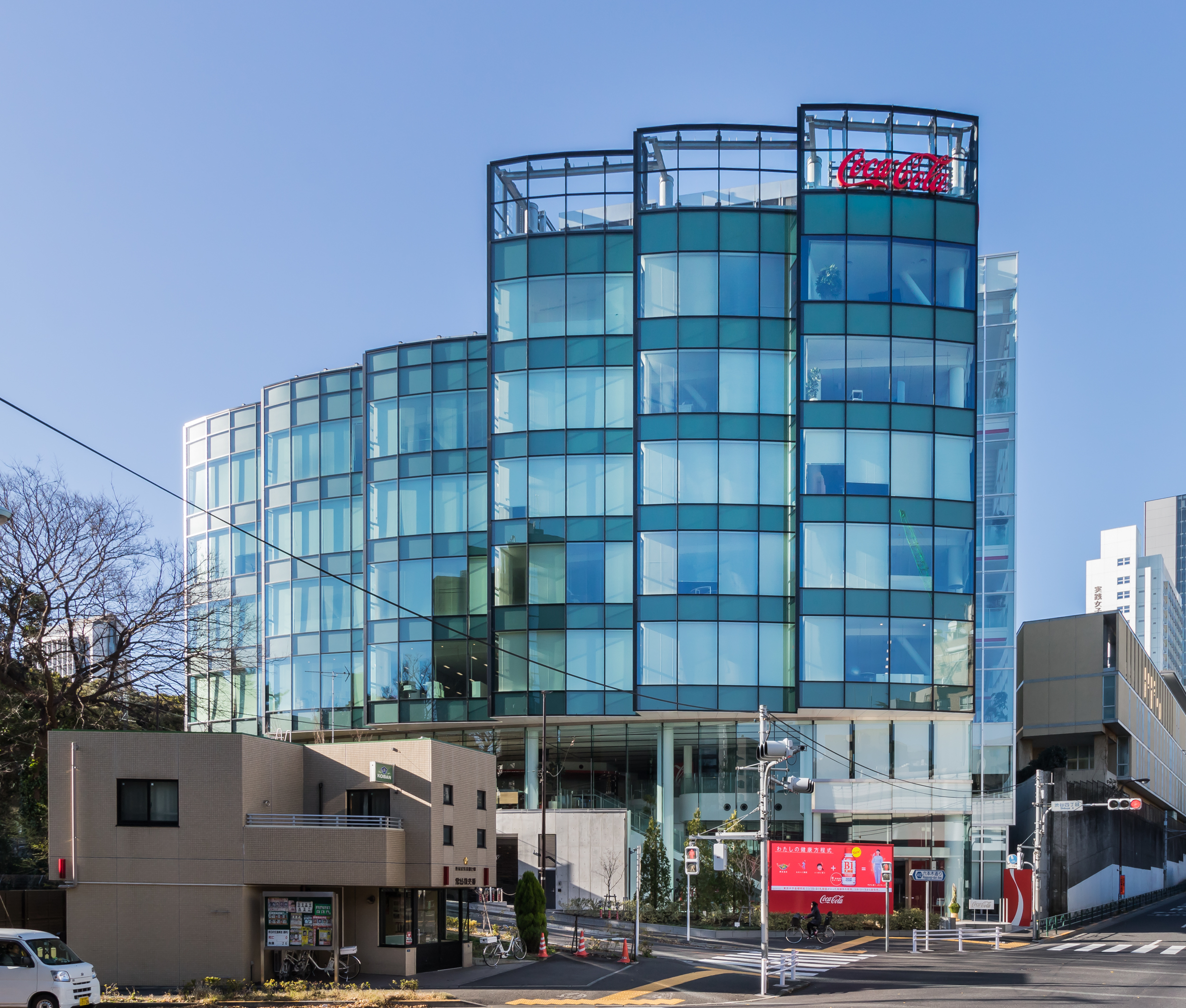 日本コカコーラ本社